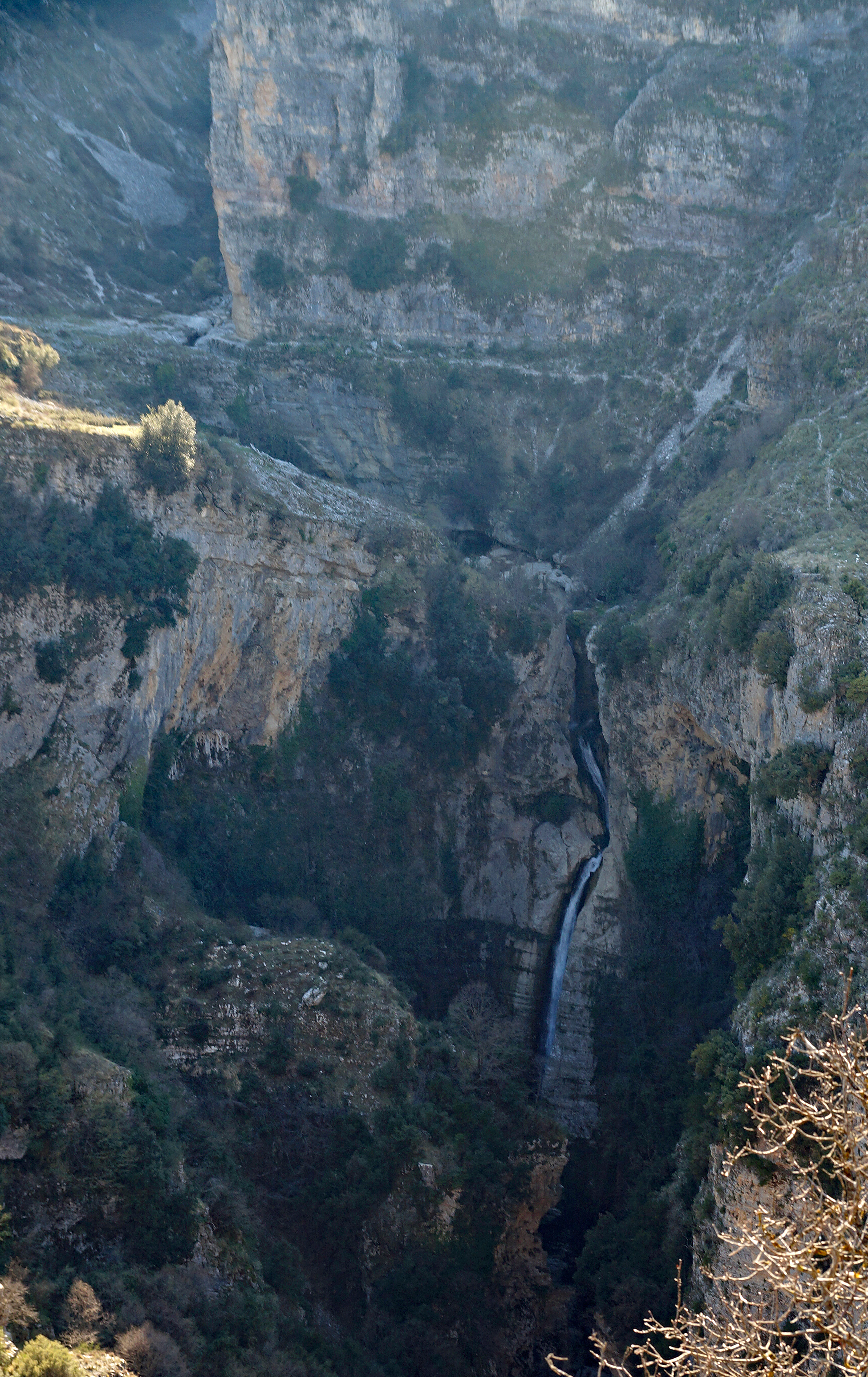 Kanionet e Nivicës, Kurvelesh: ujëvarë